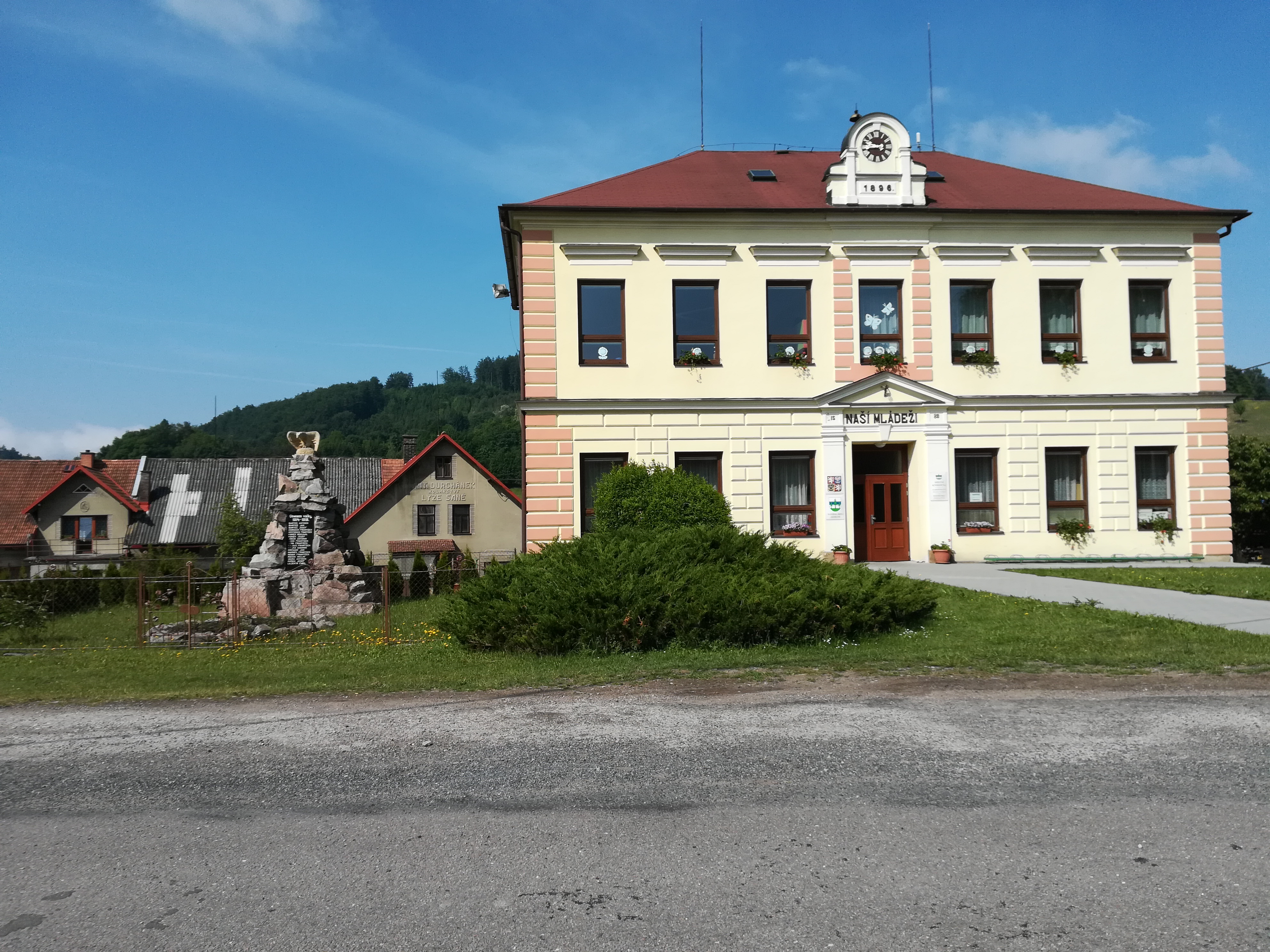 Záchlumí - škola